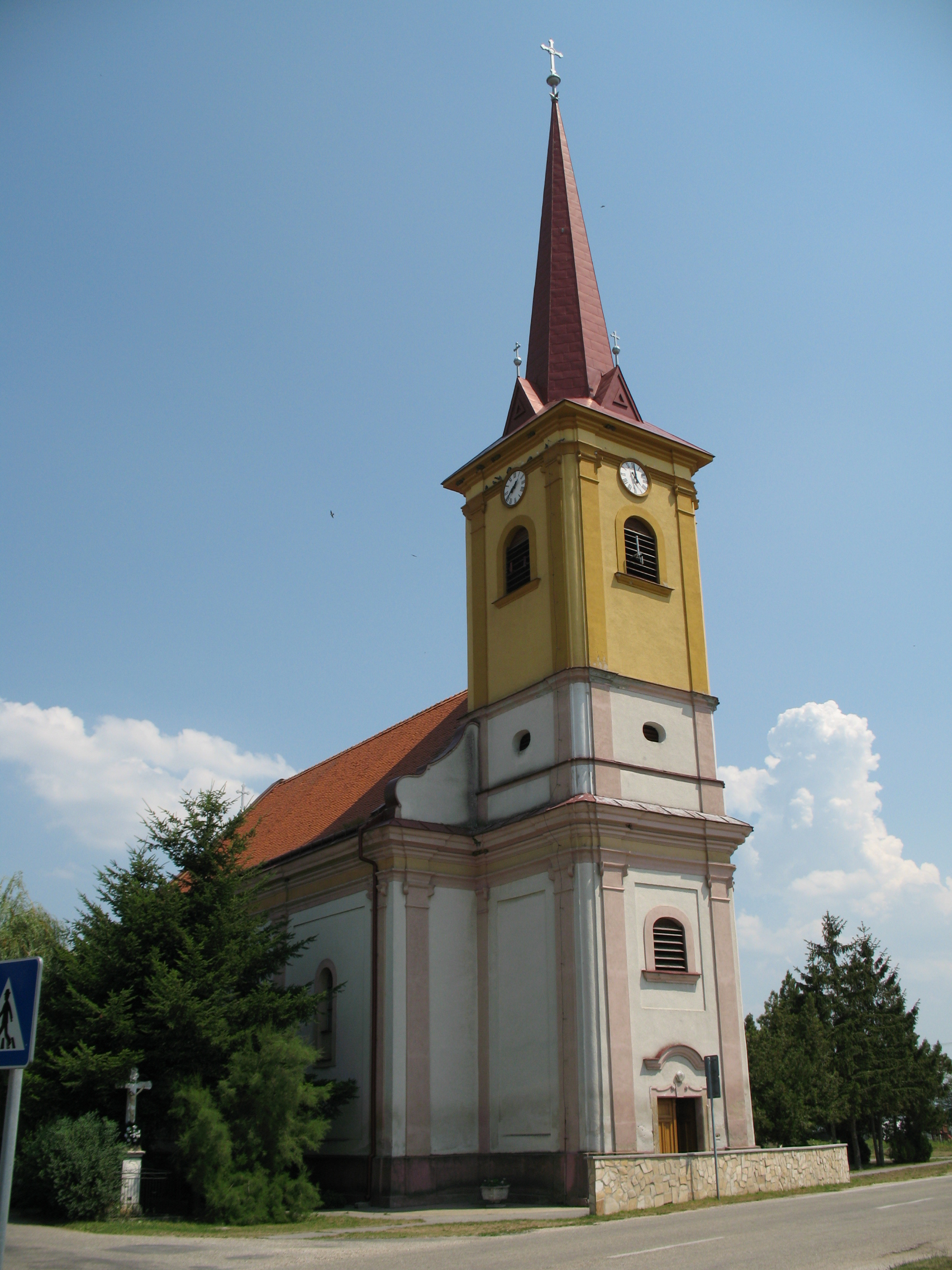 Kőhídgyarmat temploma